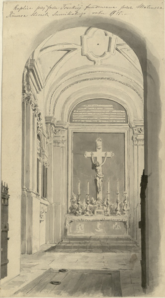 Беларуская (тарашкевіца): Трокі, капліца Ромэраў у касьцёле Найсьвяцейшай Панны Марыі